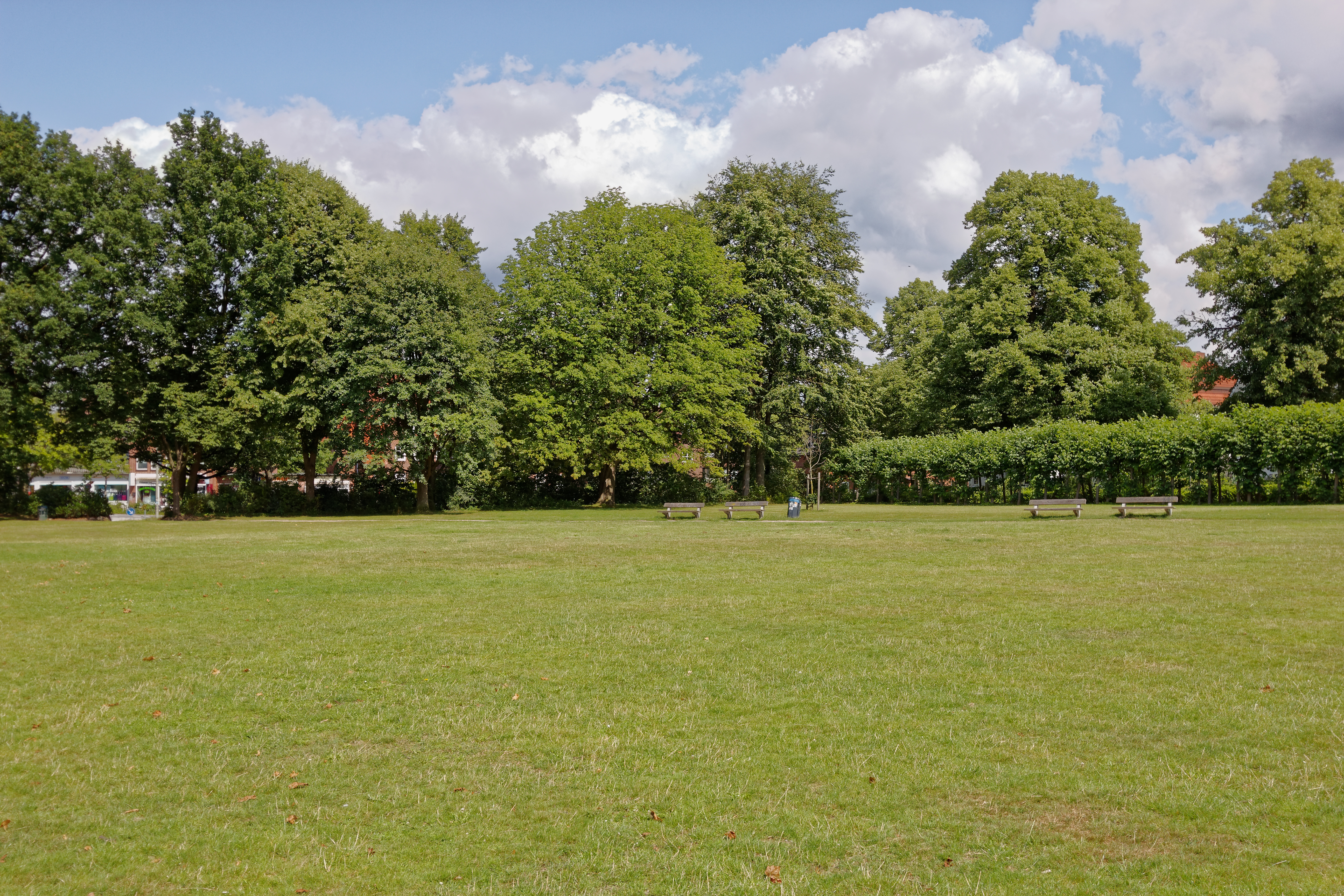 Hamburg-Fuhlsbüttel, Wacholderpark, Wiese und SolitärbaumThis is a photograph of an architectural monument.